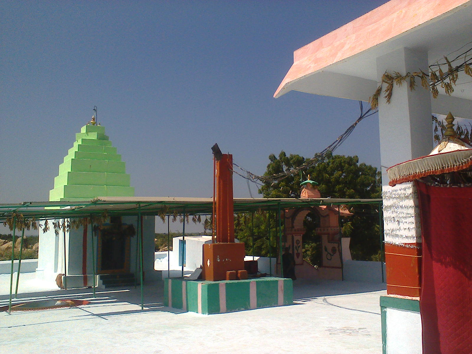 శ్రీఝుంకారేశ్వరి దేవాలయం, గొందిమళ్ళ